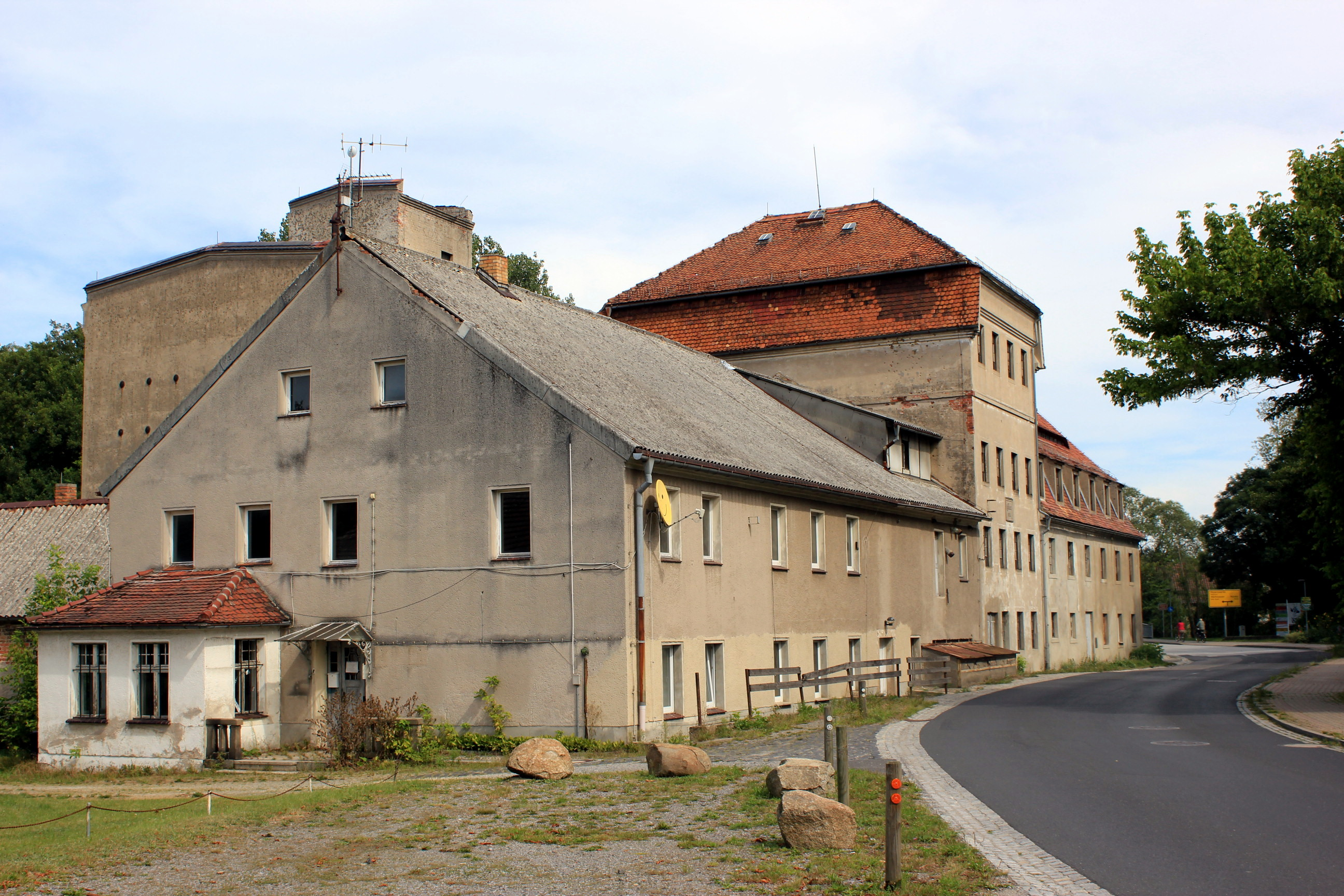 Alte Mühle in Mücka, Landkreis Görlitz, Sachsen.Hornjoserbsce: Stary młyn w Mikowje, wokrjes Zhorjelc.